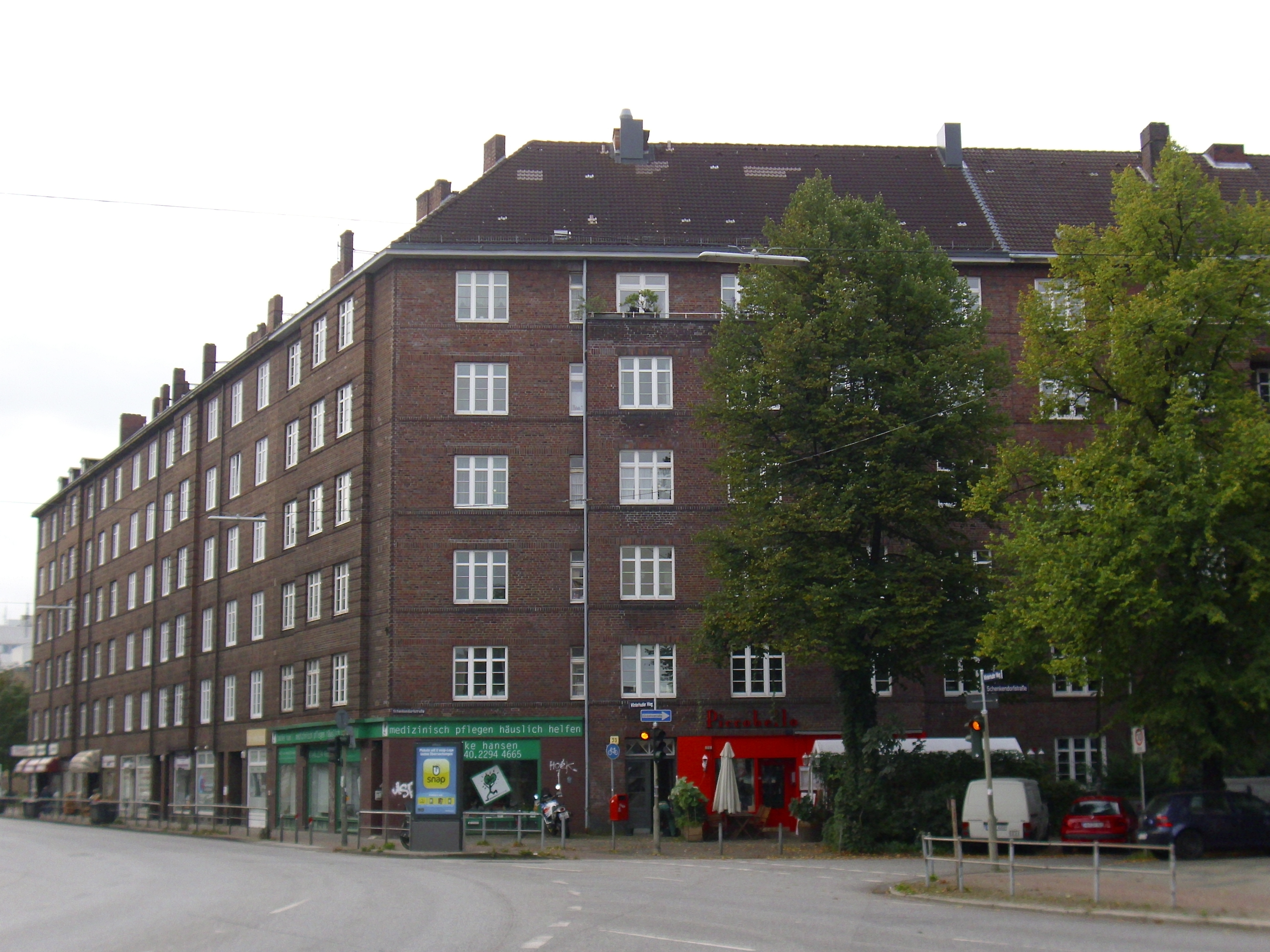 Winterhuder Weg 63 This is a photograph of an architectural monument.